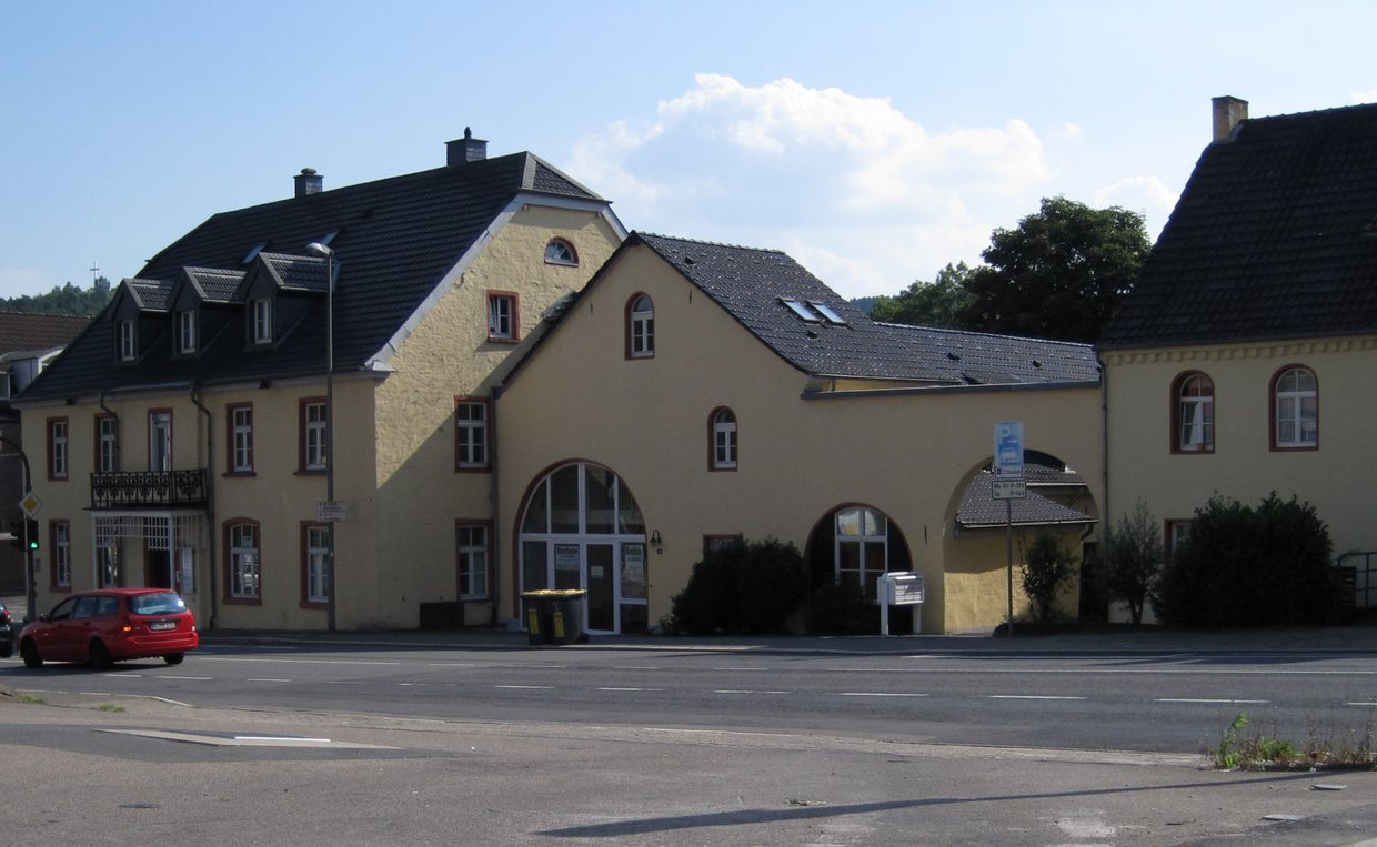 Eschbacher Mühle 2013 (heute Wohnhaus) - Google Maps - Google Earth